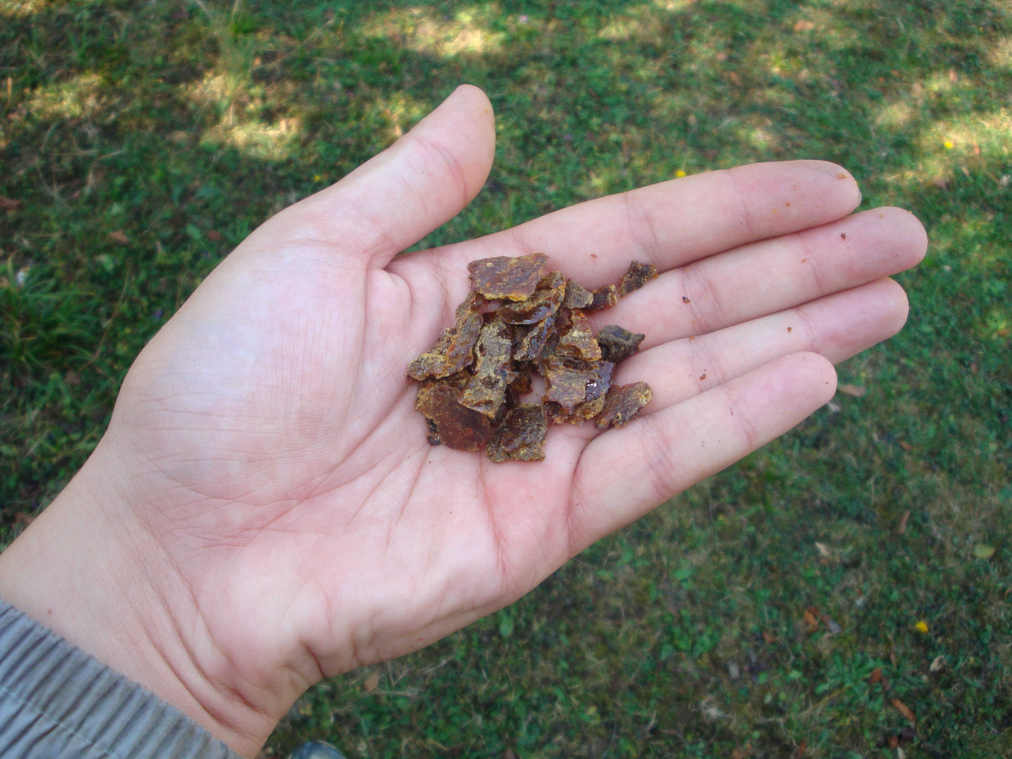 Комадићи прополиса извађени из кошнице.